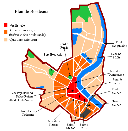 Carte de la ville de Bordeaux avec les principaux monuments.